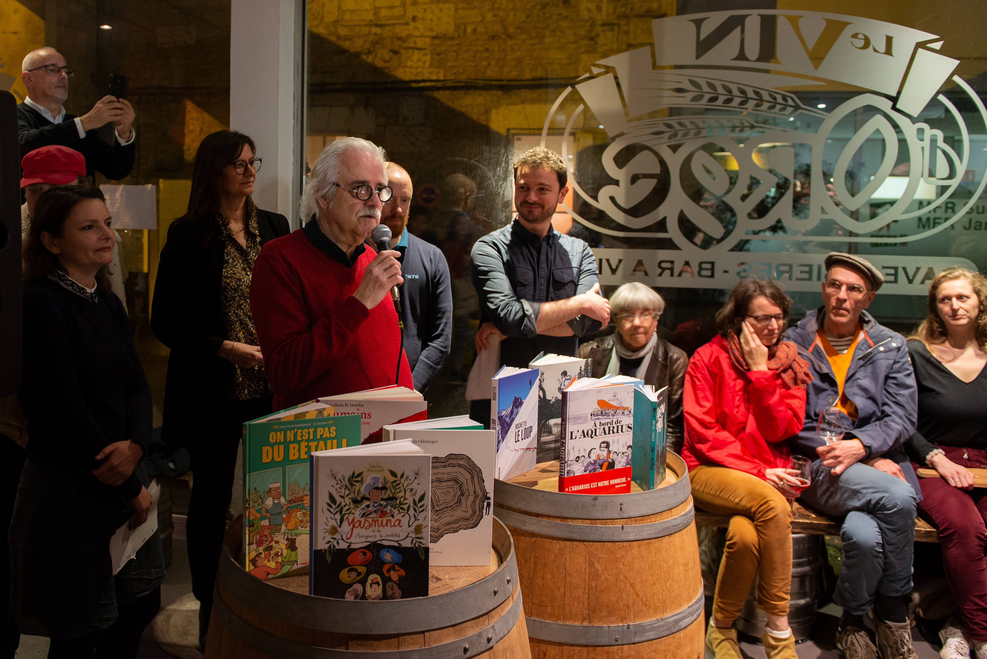 Yves Frémion présentant la remise du prix Tournesol au Festival International de la Bande Dessinée d'Angoulême 2020.